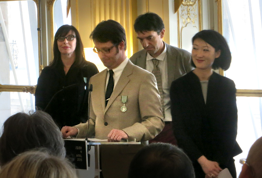 Discours de Jean-François Porchez lors de la cérémonie de remise des insignes de chevalier des arts et lettres. Sont aussi présents Anette Lenz, Pierre di Sciullo et Fleur Pellerin.